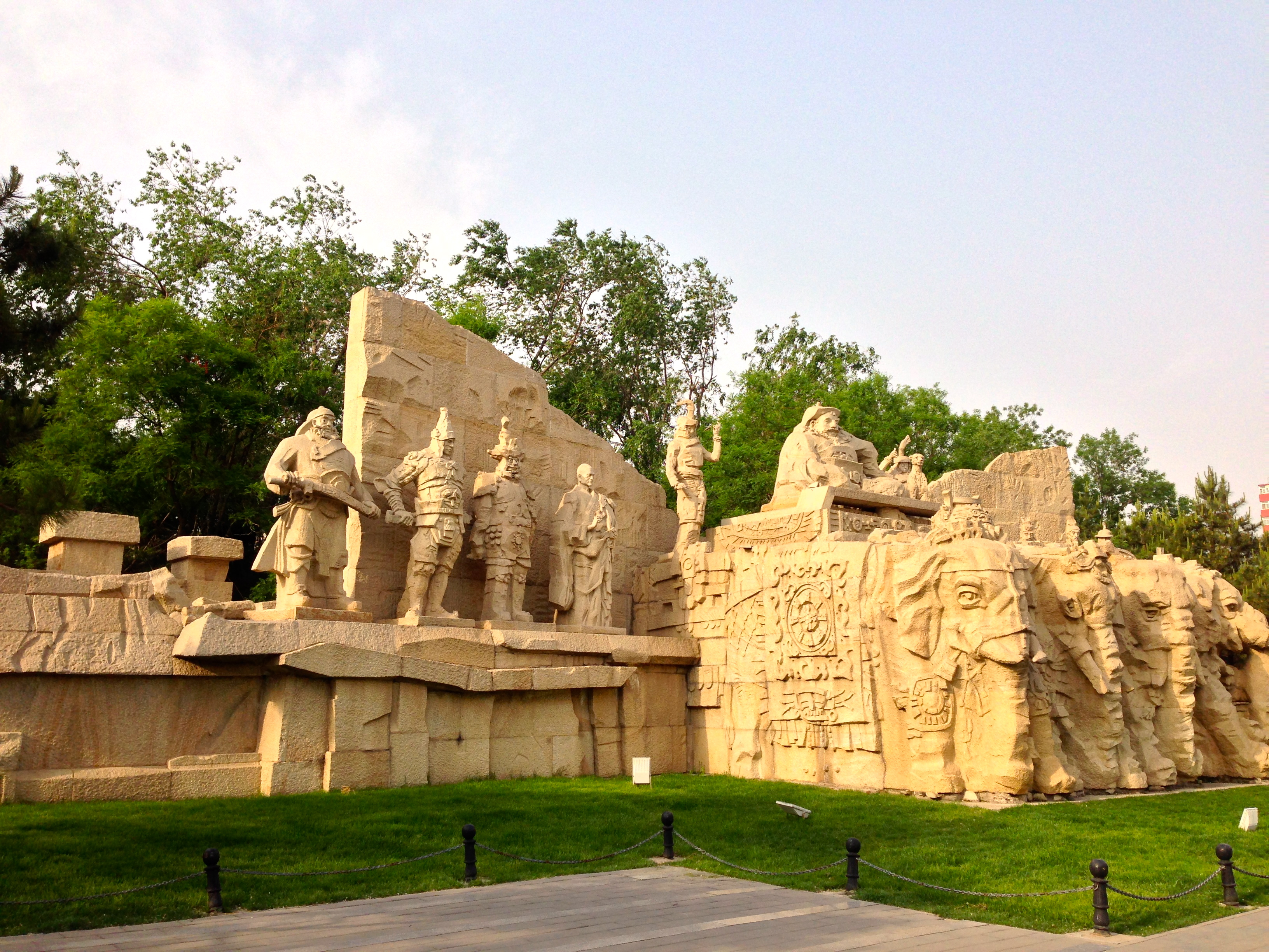 小月河